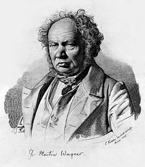 Bildnis des Malers Johann Martin von Wagner